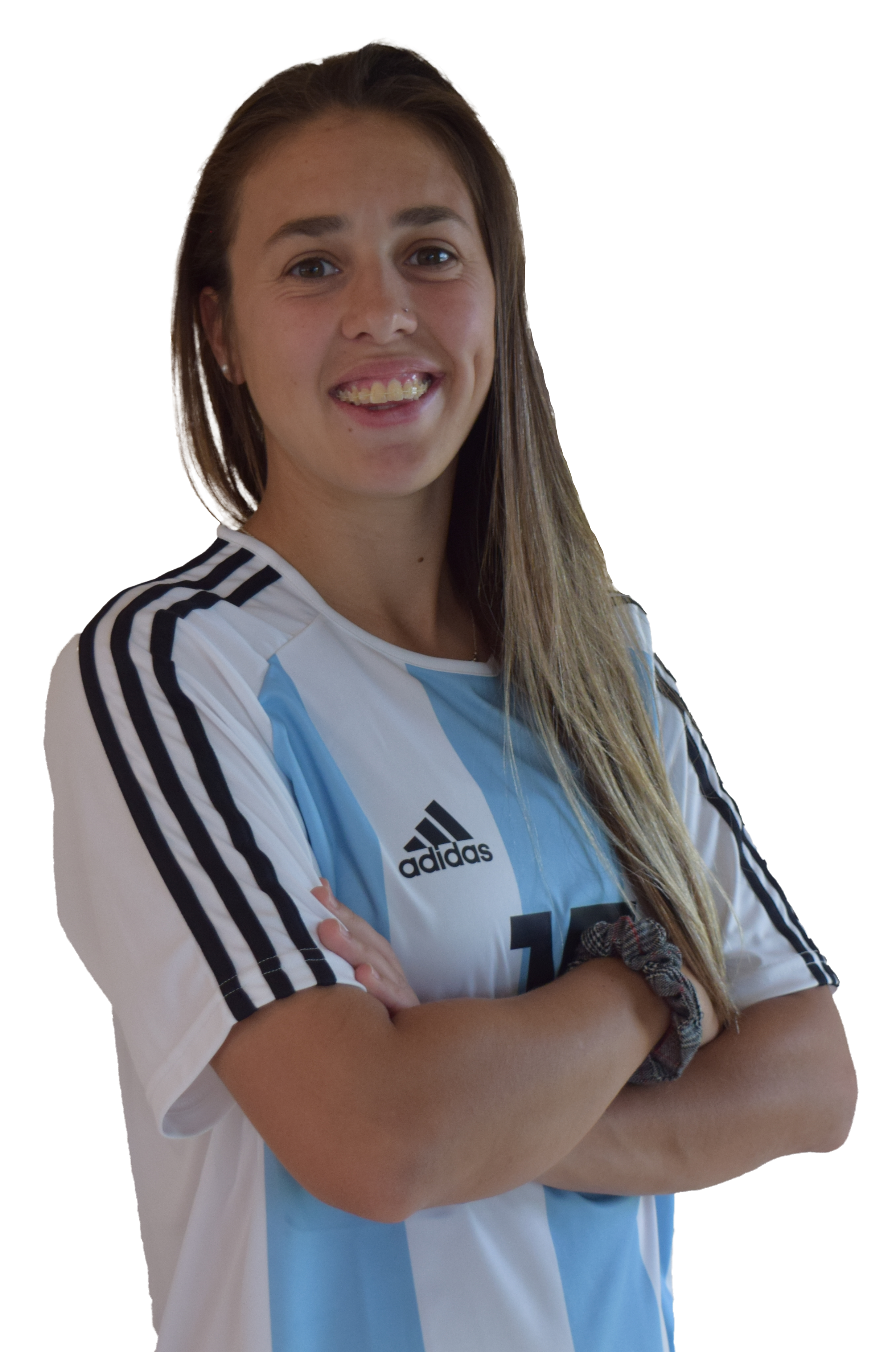 Adriana Sachs, jugadora de la selección mayor femenina de fútbol de Argentina.Foto sacada previo al primer partido del repechaje por un lugar para el mundial de futbol femenino de Francia 2019